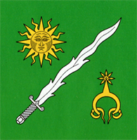 Flag of Budeşti, Chişinău